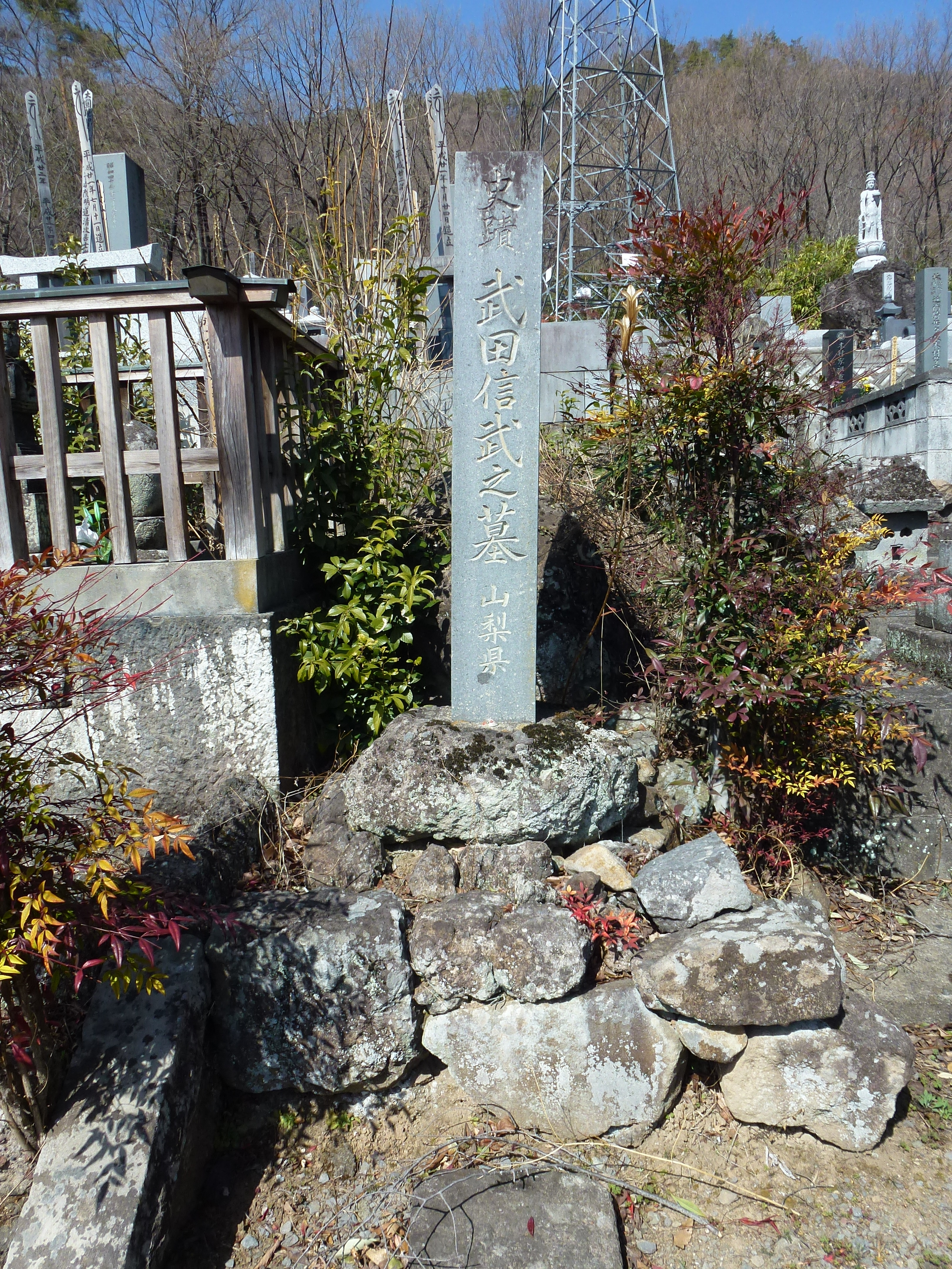 Grab von Takeda Nobutake auf dem Friedhof des Tempels Hohsen-ji in Kohfu.